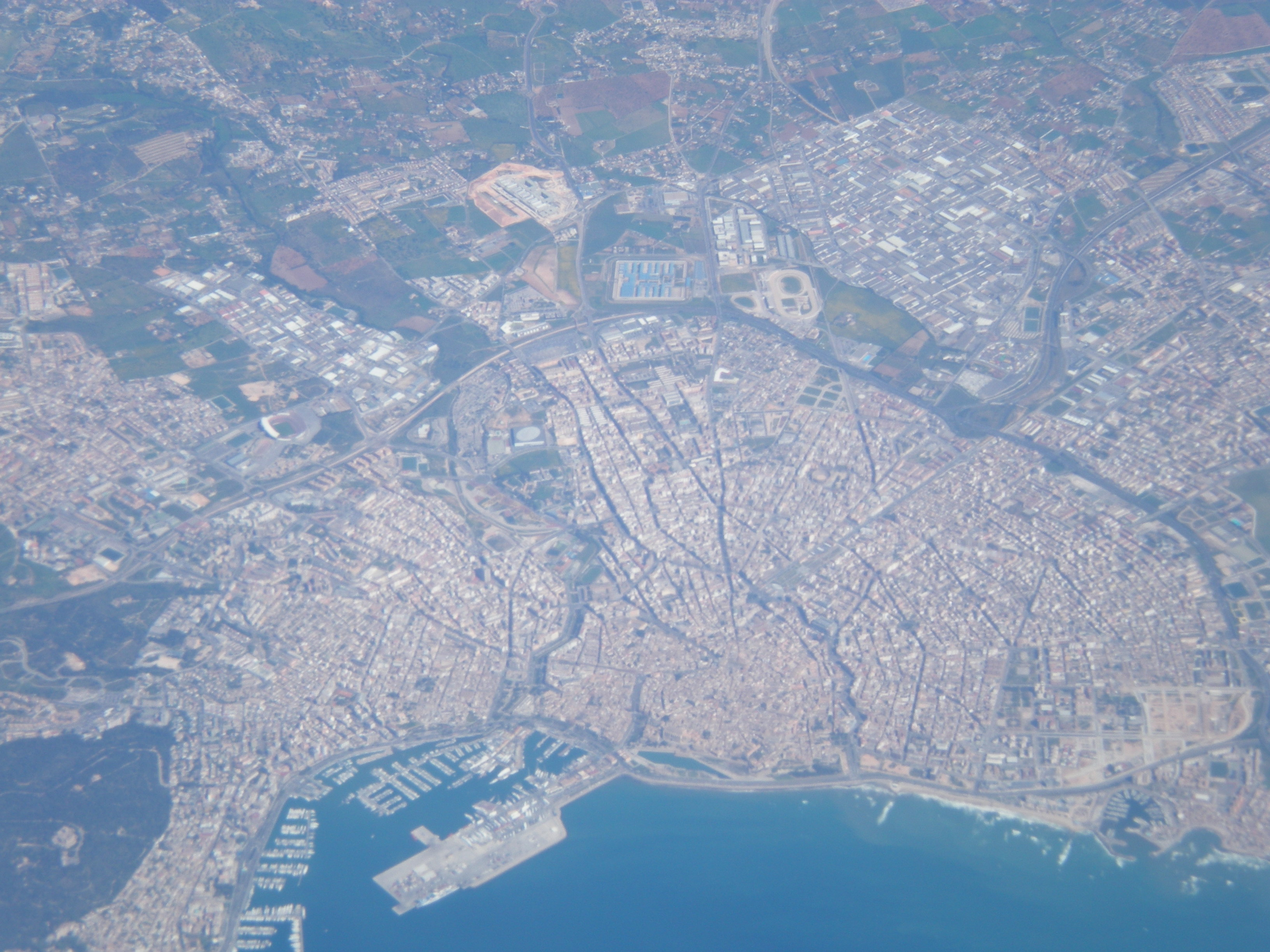 Vista aérea del casco urbano de Palma de Mallorca, Islas Baleares, España.